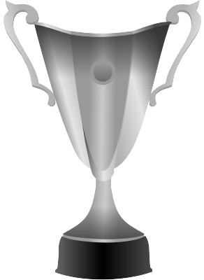 Trofeo Coppa delle Coppe Immagine disegnata da Riccardo de Conciliis